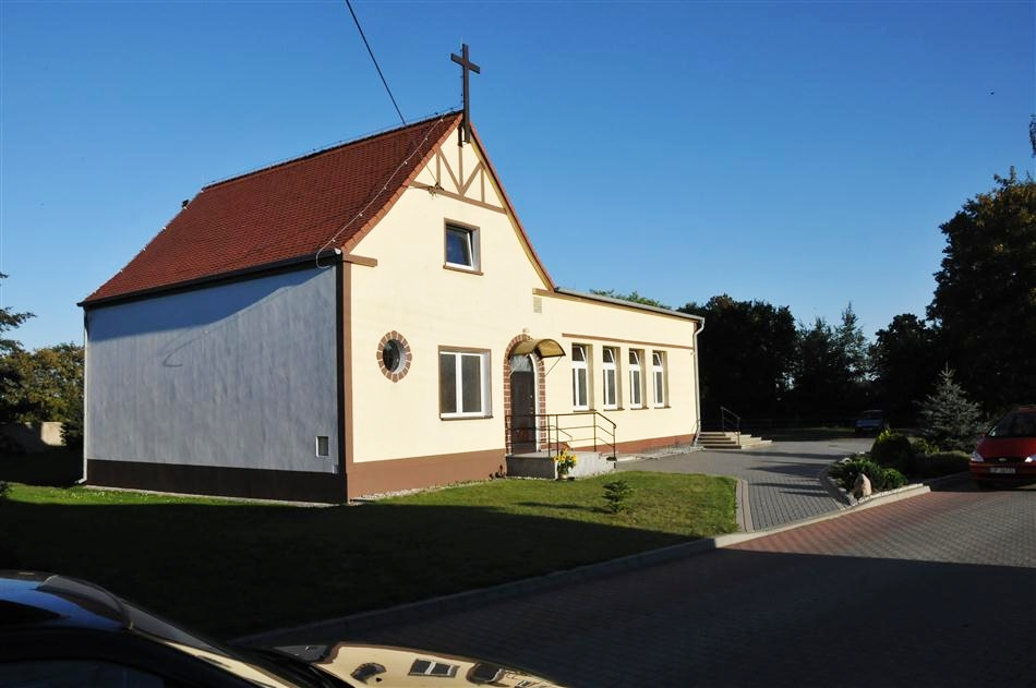 Kaplica Podwyższenia Krzyża Świętego w Folwarku